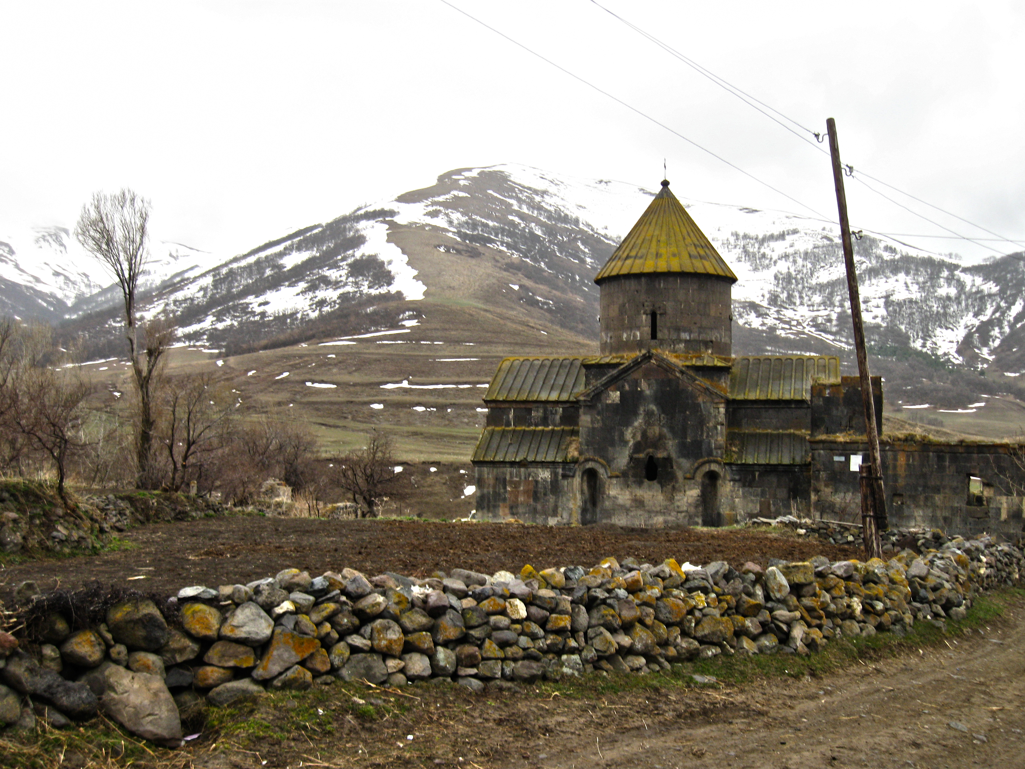 Եղիպատրուշի եկեղեցին 40/3